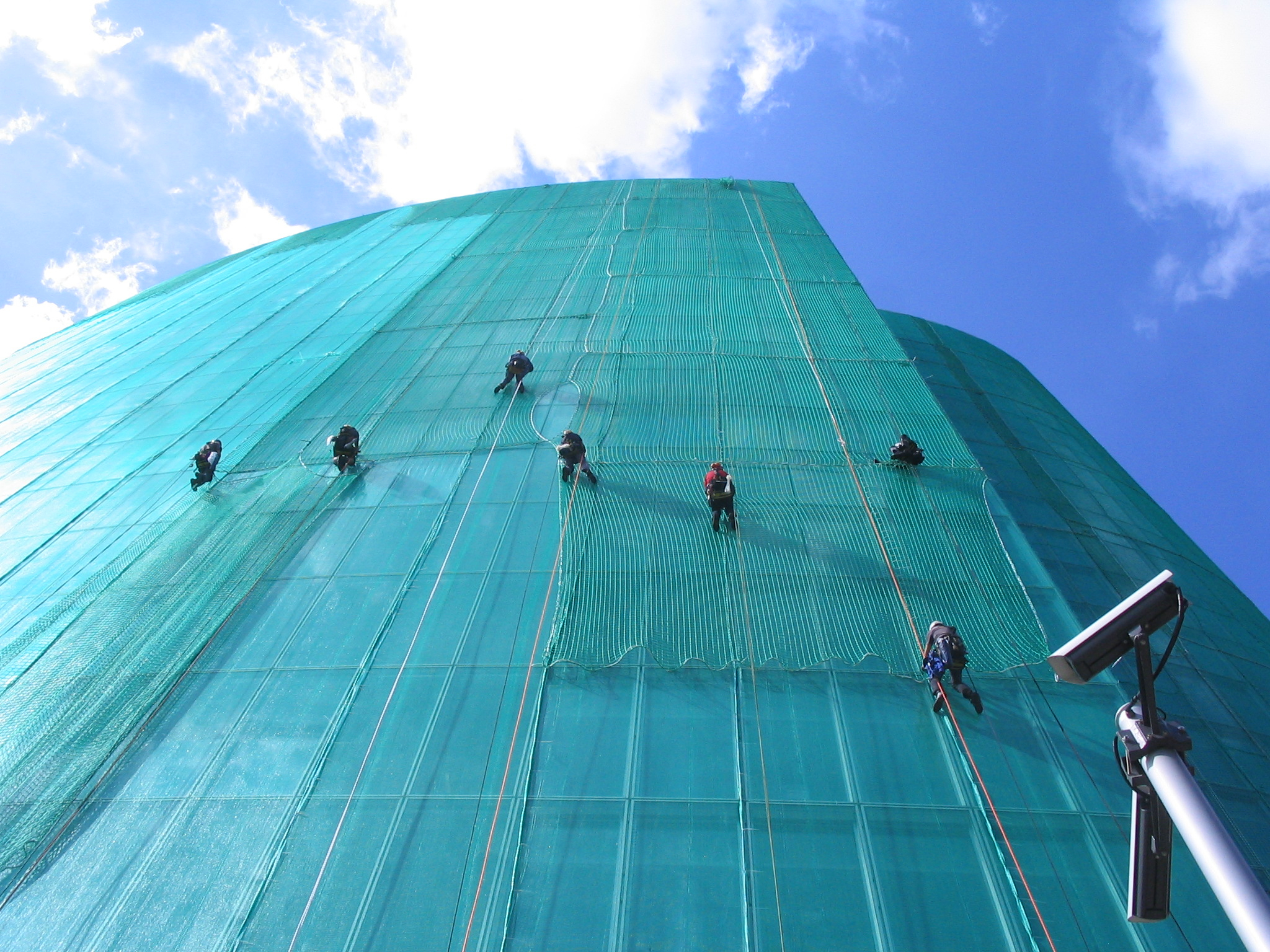 GAP 15, Düsseldorf, Graf-Adolf-Platz 15, Germany